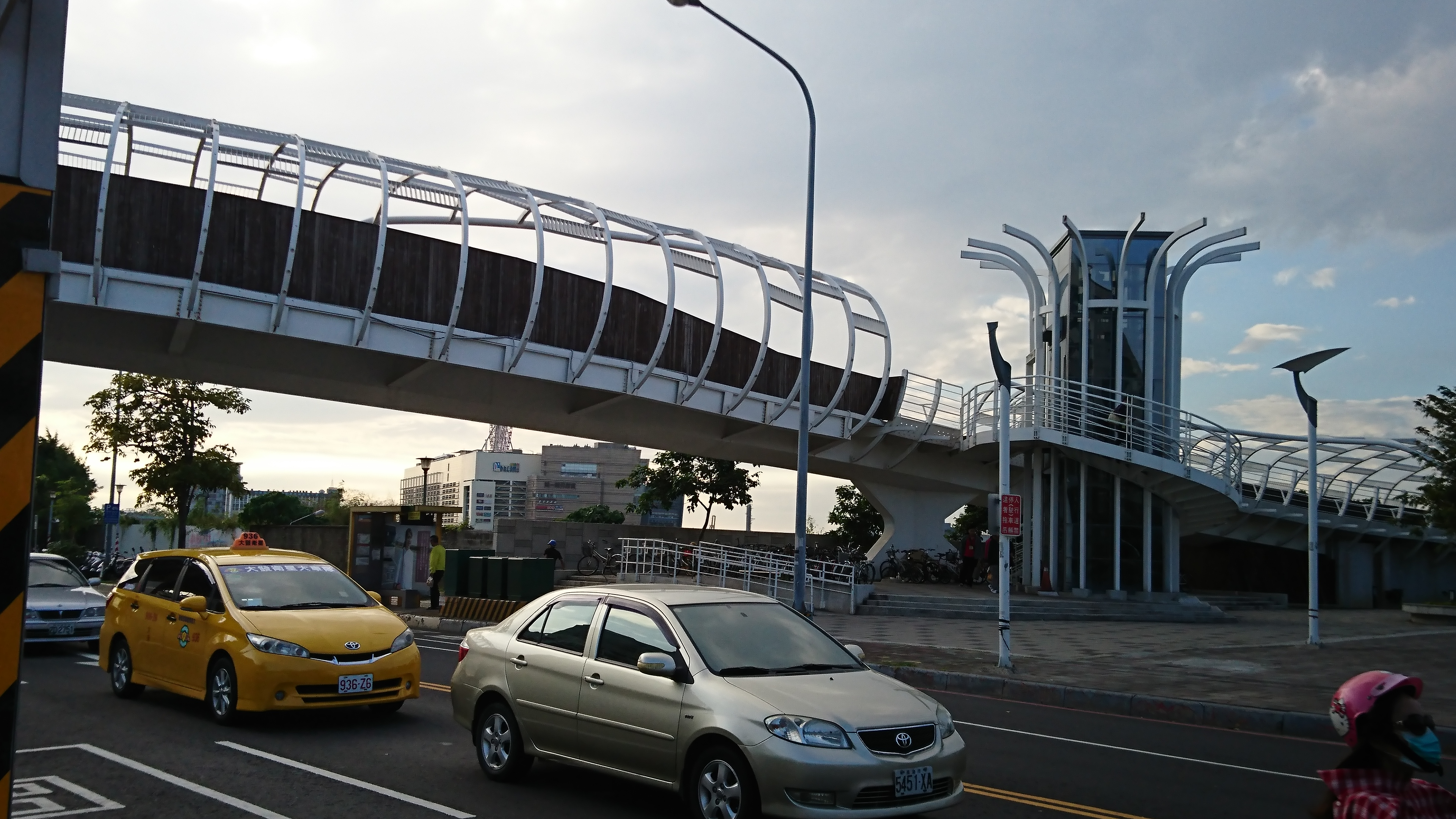 前鎮之星自行車道